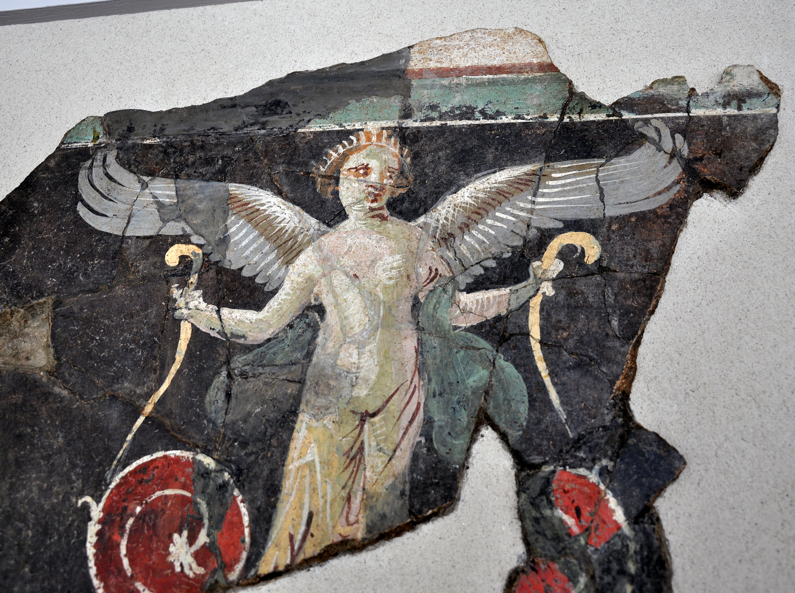 Génie ailé tenant des rinceaux. Détail d'une peinture murale, datée du 1er siècle, et provenant du péristyle d'une maison gallo-romaine, découverte en 1977 rue du 11 Novembre à Vienne (France). Cette peinture représente des échassiers sur la plinthe et des génies ailés au sommet de mâts décorés sur le registre supérieur. Site et musée de Saint-Romain-en-Gal-Vienne.